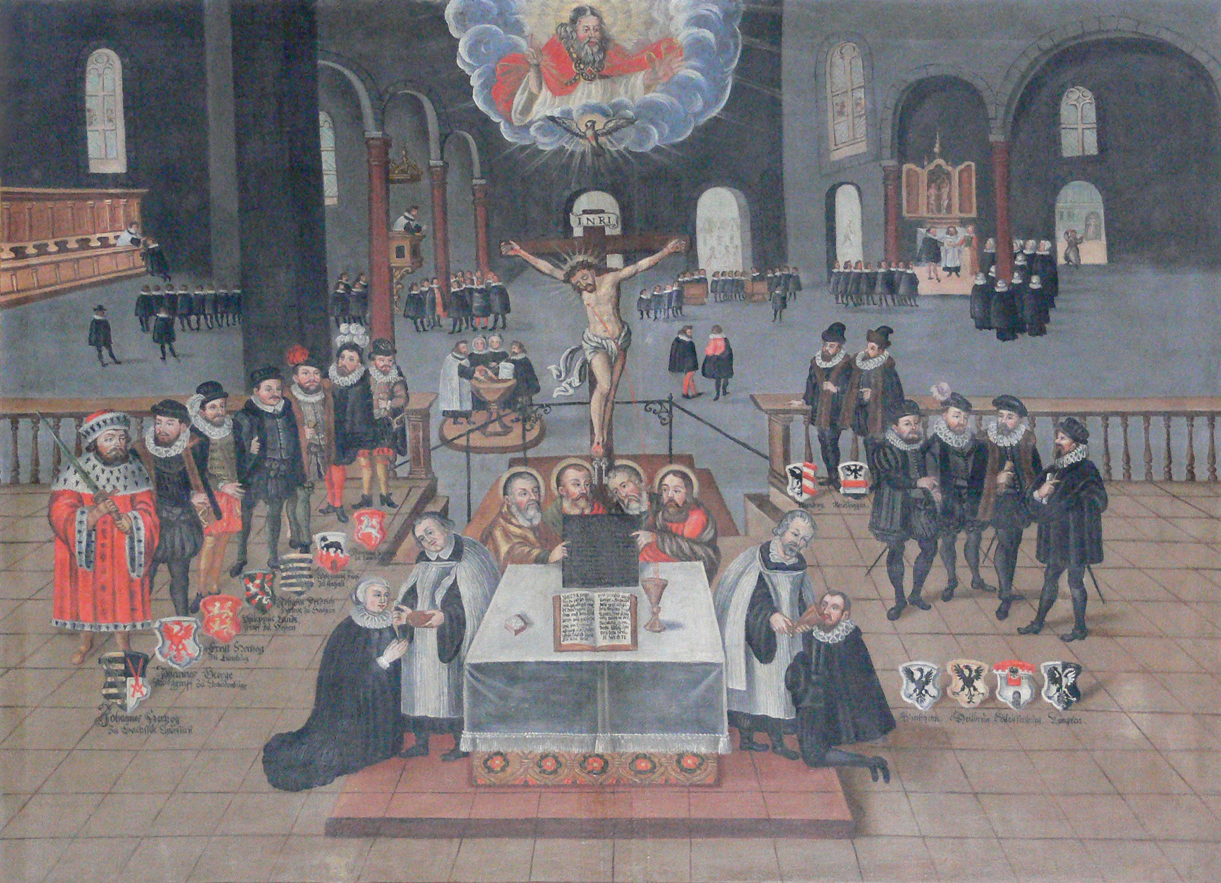 Luckau, Landkreis Dahme-Spreewald, Brandenburg St.-Nikolai-Kirche, Gemälde